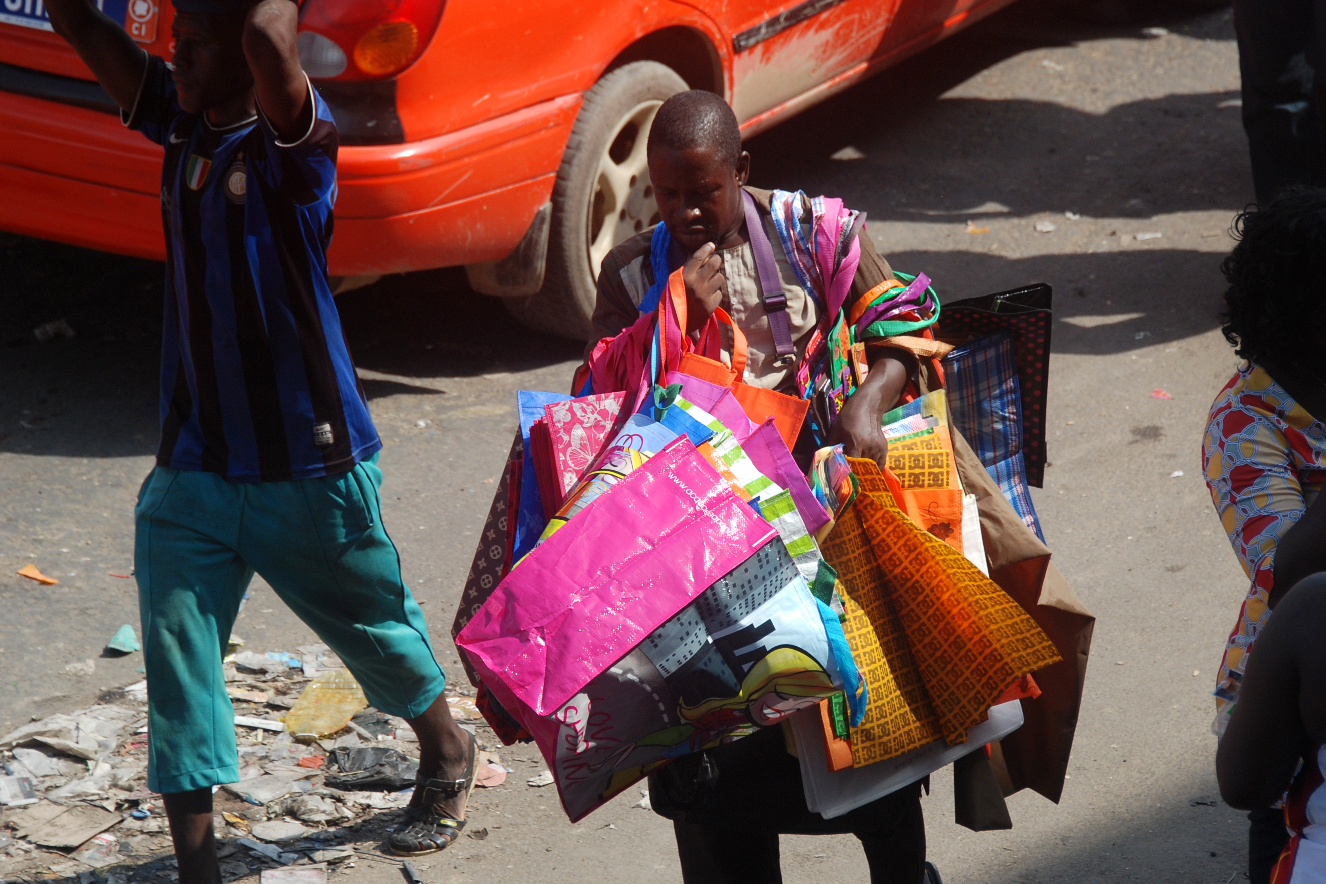 vendeur de sacs en plastique dans les rues d'Abidjan This is an image of "African people at work" from Ivory Coast